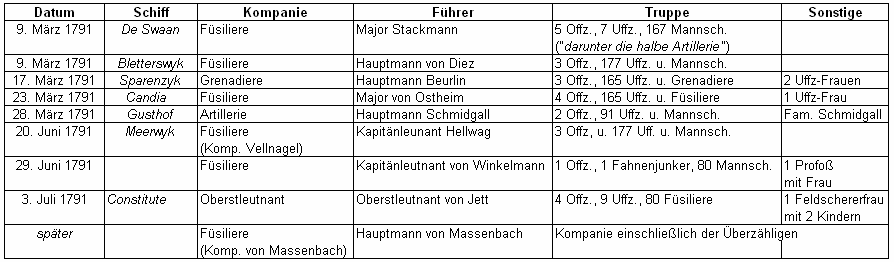 Transport des württembergischen Kapregiments vom Kap der Guten Hoffnung nach Batavia 1791